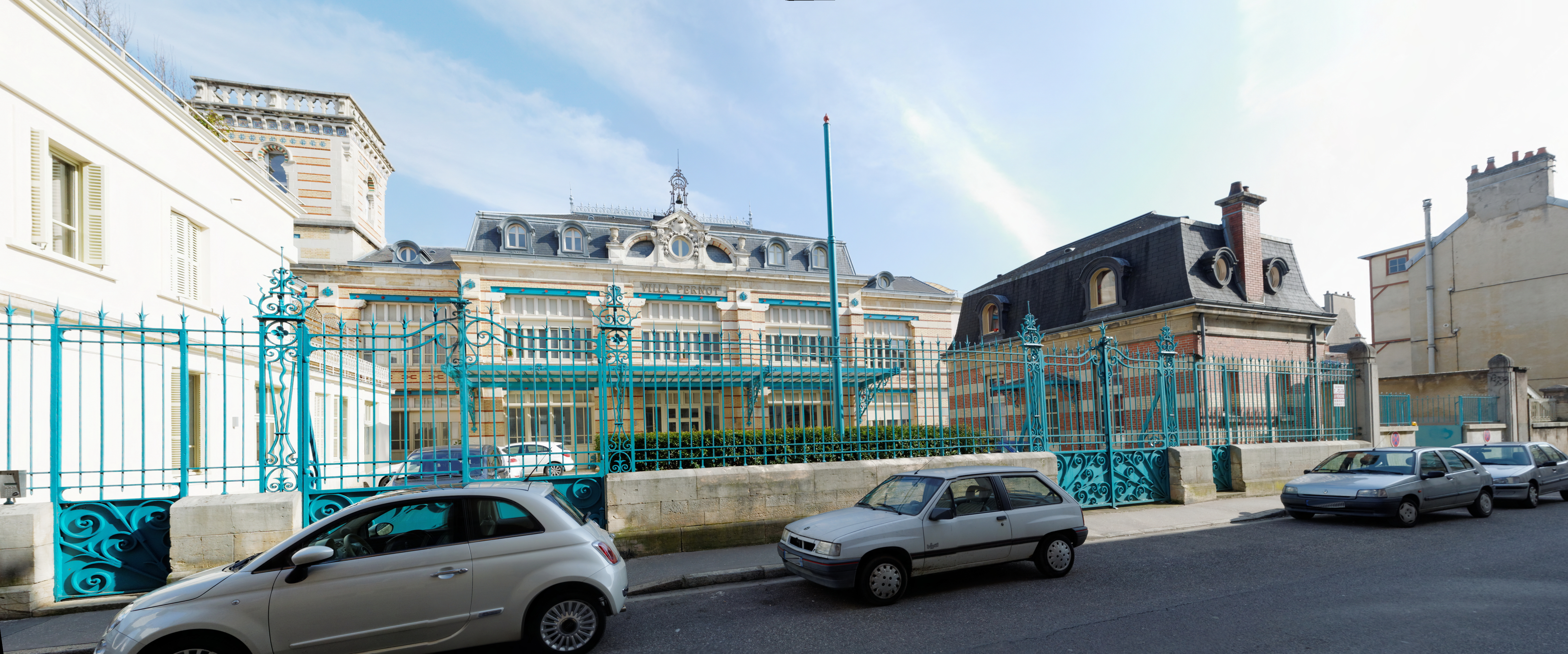 Usine de biscuits Pernot, 10 à 18 rue Courtepée (Inscrit, 1983) .